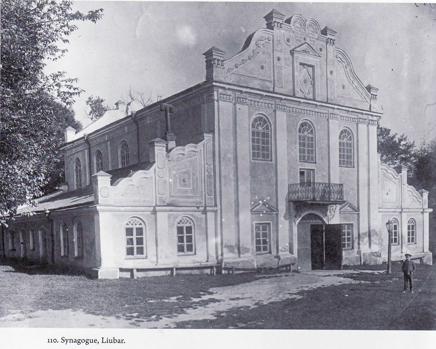 Синагога в Любарі в 1912-1914 рр. У 1912-1914 роках єврейське історико-етнографічне товариство провело під керівництвом С. Анського три етнографічні експедиції по єврейських містечках в російській межі осілості. Вони збирали фольклор, предмети культу та побуту, записали безліч пісень та інтерв'ю, зробили сотні фотографій. До наших днів збереглося близько трьохсот п'ятдесяти фотографій, які знаходяться зараз в Петербурзькій юдаїці.